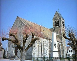 Claude Simonnet Image personnelle Eglise Saint Martin d'Aufferville